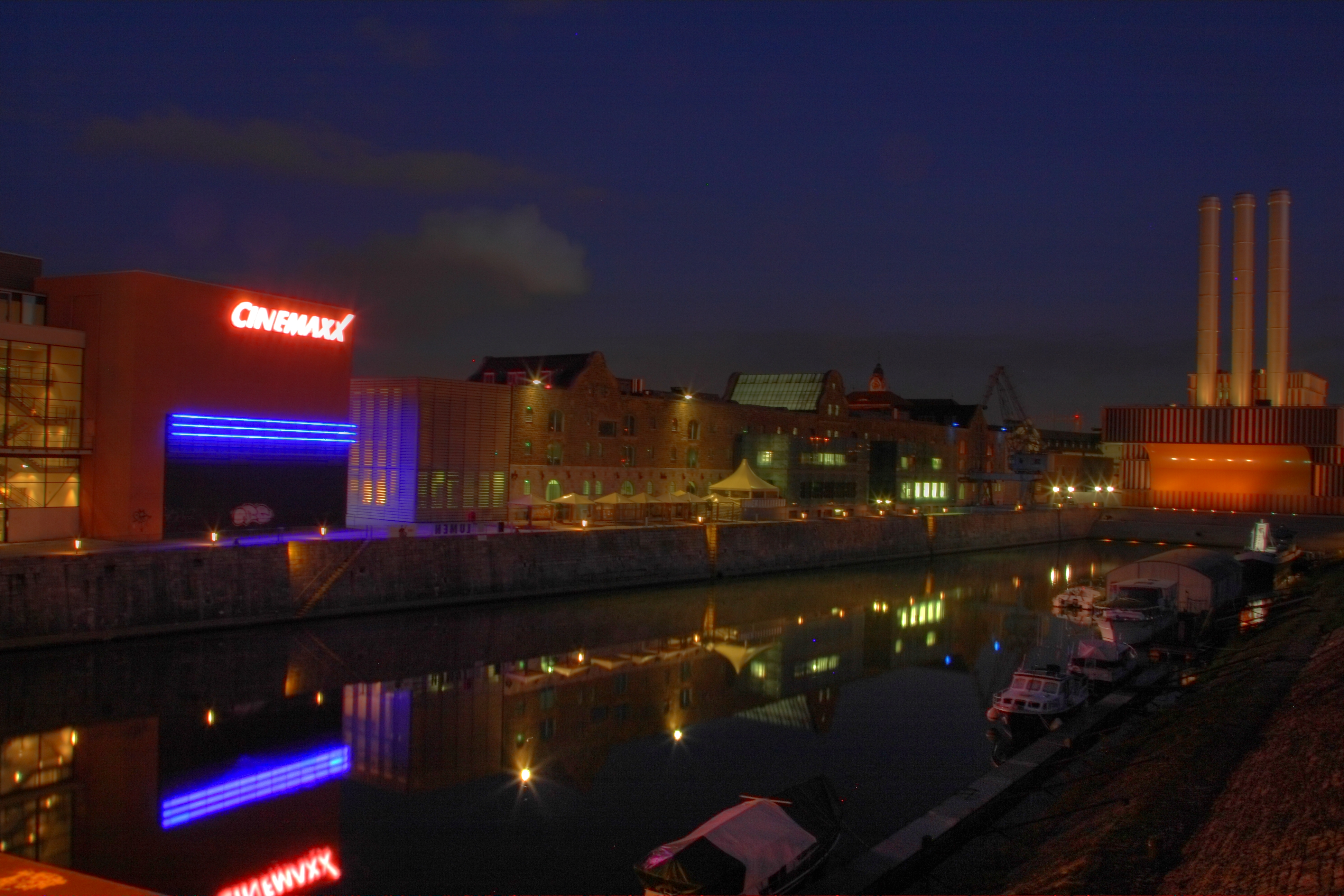 Alter Hafen von Würzburg als HDR Bild